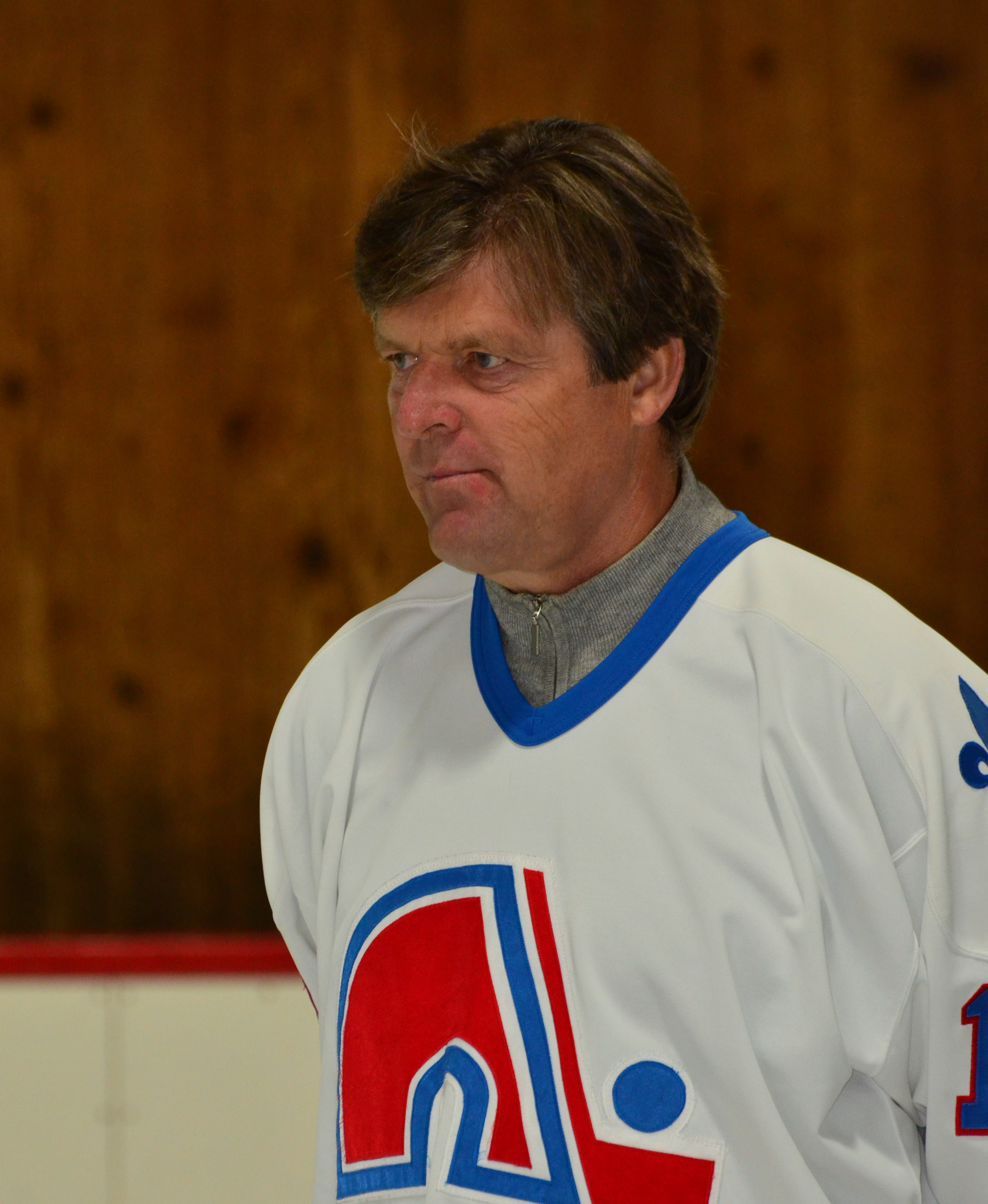 Le joueur de hockey Marian Stastny lors d'une activité publique.